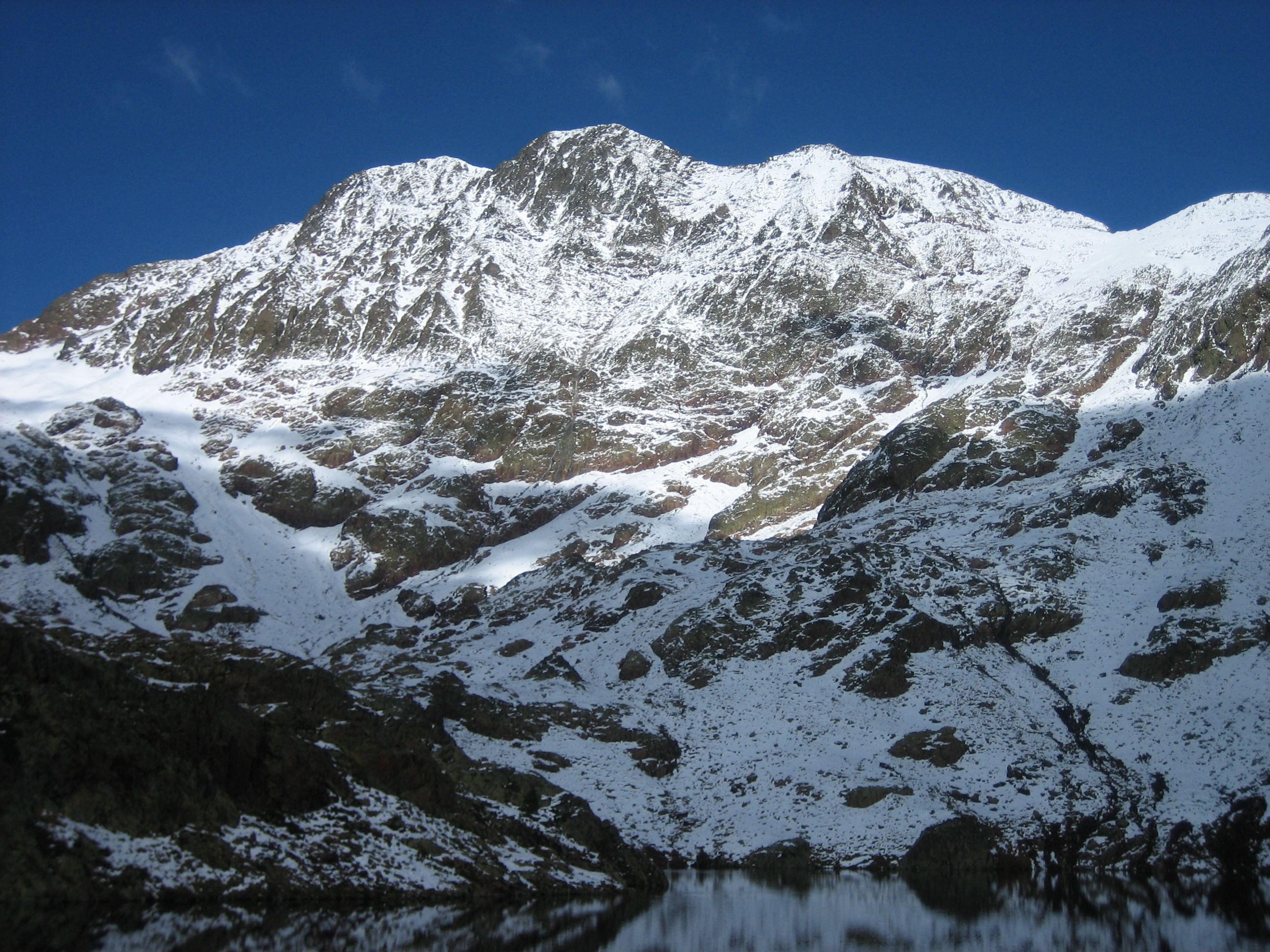 Pica d'Estats (massís del Montcalm) This is a a photo of an emblematic summit in Catalonia, Spain, with id: CE-271064006